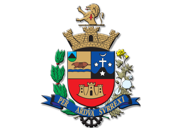 Bandeira do município de: Tatuí, São Paulo, Brasil